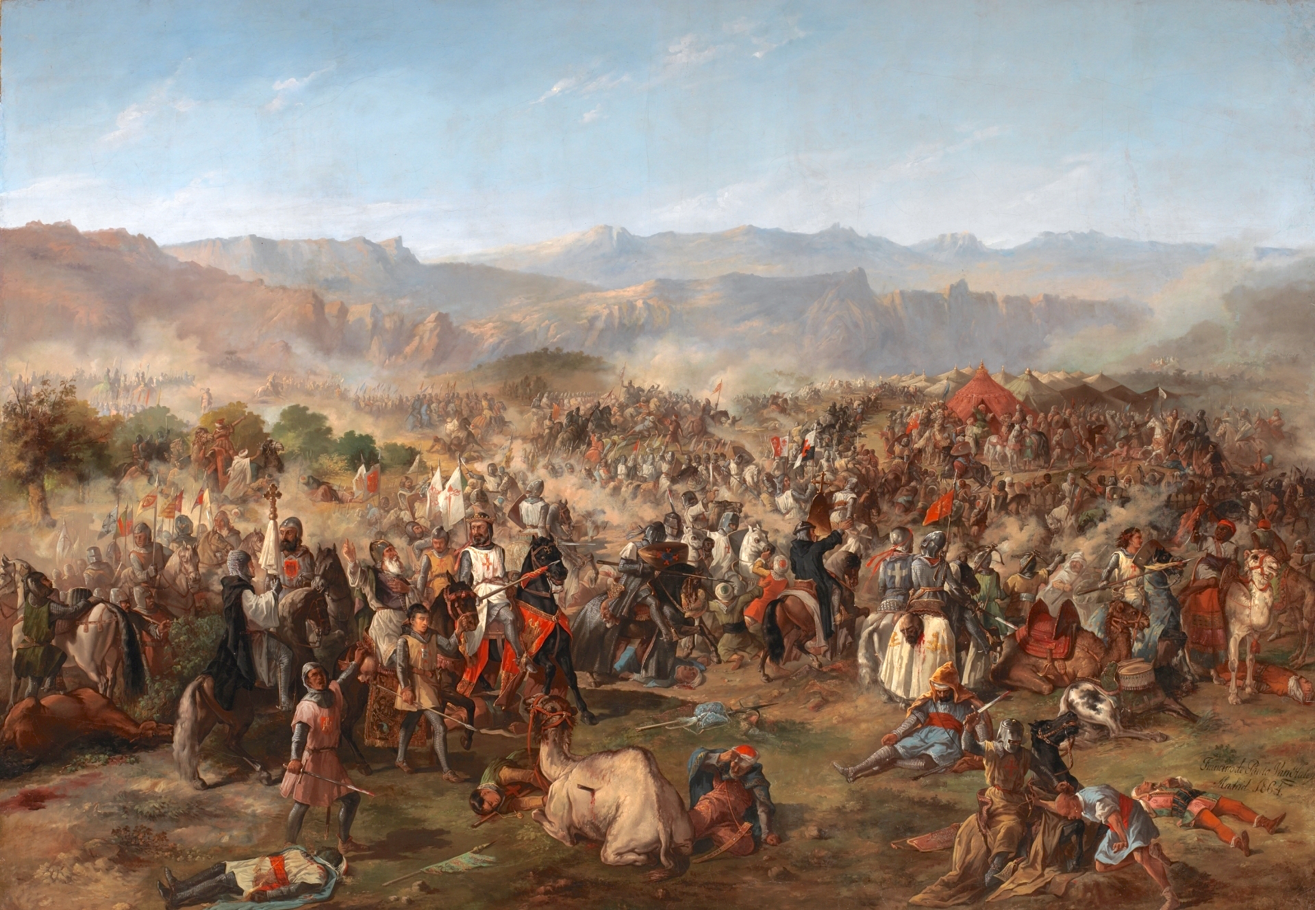 Esta obra, que fue depositada por el Museo del Prado en 1878 en el Palacio del Senado de España, representa la batalla de las Navas de Tolosa, que se libró el día 16 de Julio de 1212 en las cercanías del municipio jienense de Santa Elena. Y es conocida también como la batalla de los tres reyes, ya que en ella combatieron los monarcas Alfonso VIII de Castilla, Pedro II de Aragón y Sancho VII de Navarra.